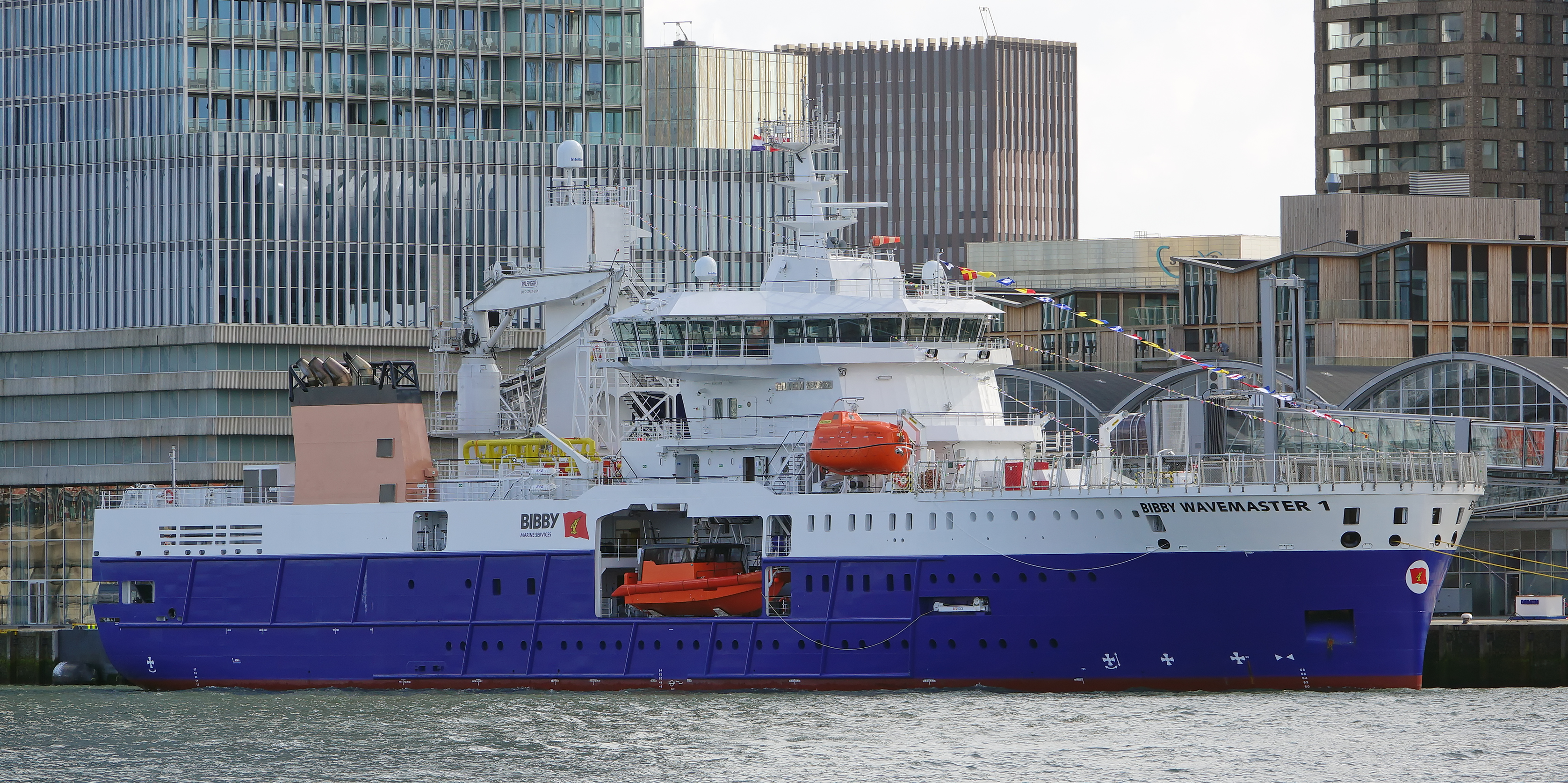 Holland Americakade 6-9-2017 BIBBY WAVEMASTER 1 Bouwjaar 2017, imonummer 9773595, grt 6241 Eigenaar Bibby Marine Services Ltd., Liverpool Manager Bibby Marine Management Ltd. Gebouwd Santierul Naval Damen Galati SA / 553016 / Damen Shipyards B.V., Gorinchem Een Service Operations Vessel (SOV), uitgerust met een Walk-to-Work (W2W) systeem Ze is op 24 maart jl. te water gelaten bij de Damen-werf in het Roemeense Galati